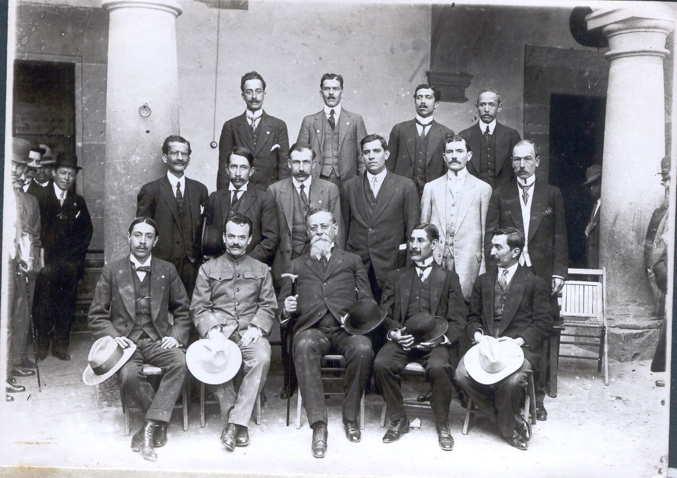 Diputados Constituyentes de 1917 del Estado de Michoacan